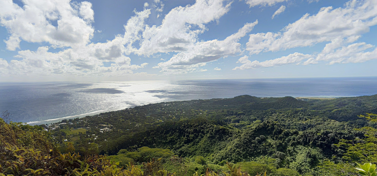 נוף לים מהרים באי ררוטונגה